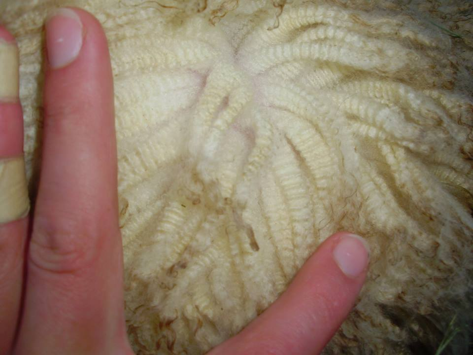 suomenlammas